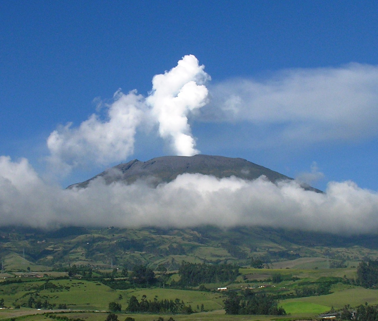 Volcán Galeras - Pasto - Colombia. Foto: José Camilo Martínez S. Imagen tomada durante una fumarola de vapor.